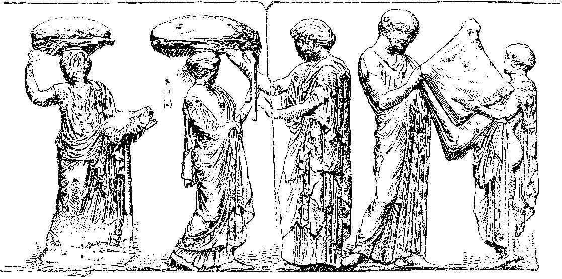 Le remise du péplos d'Athéne Pollia par les arrhéphores.